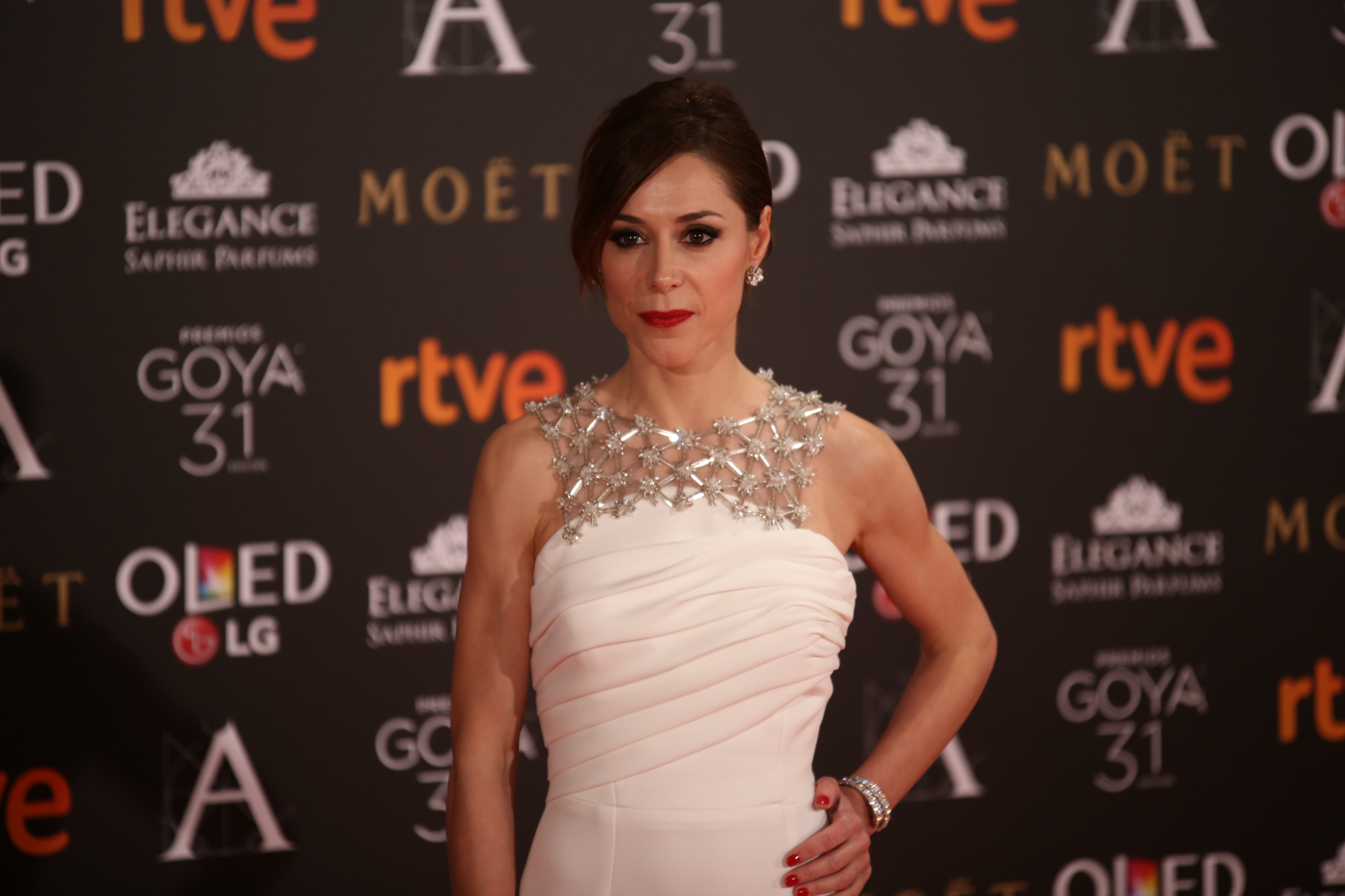 Premios Goya 2017